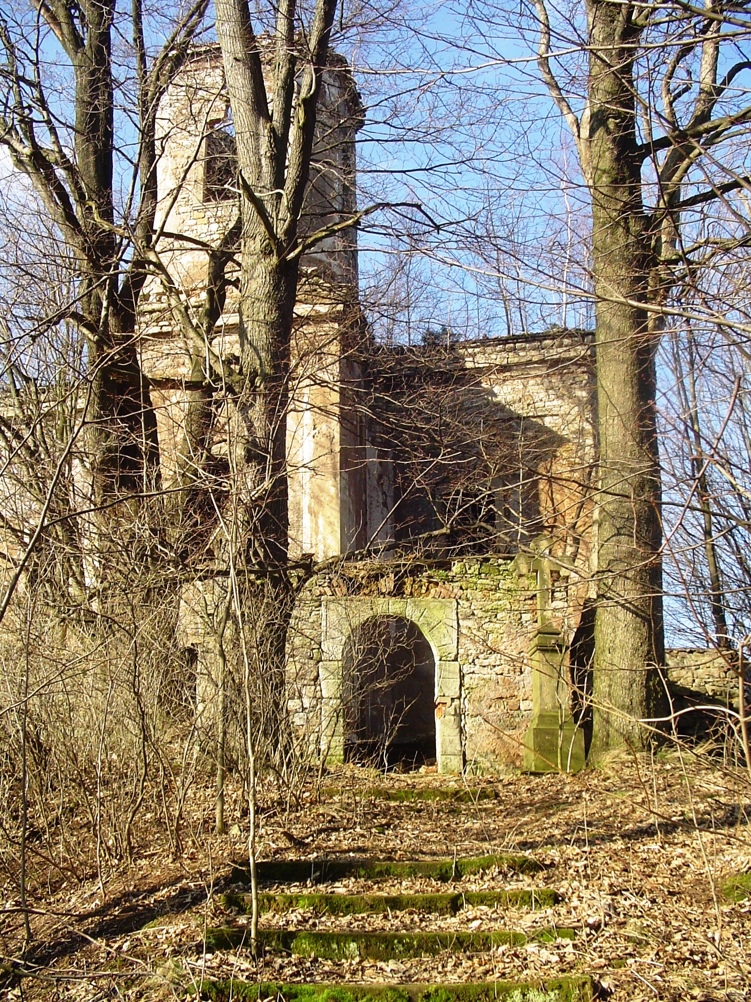 Uniemyśl - ruiny kościoła filialnego p.w. św. Mateusza, XVIII w.